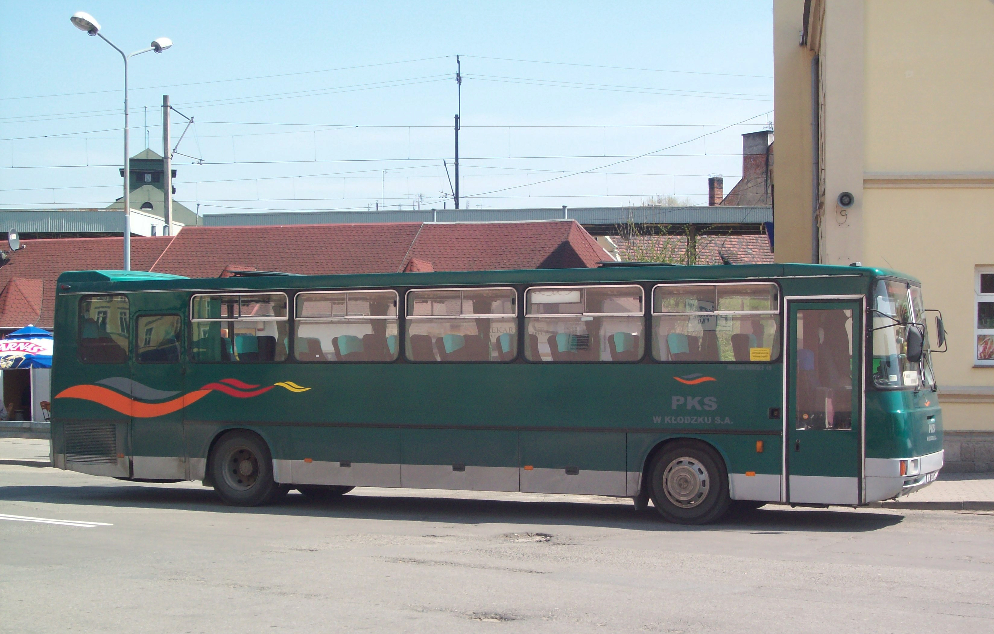 Autobus PKS Kłodzko linii 1 do Krosnowic na dworcu PKS z logiem spółki